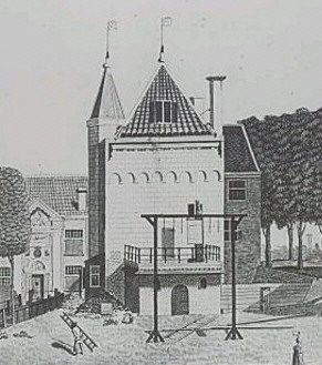 It Blokhûs.